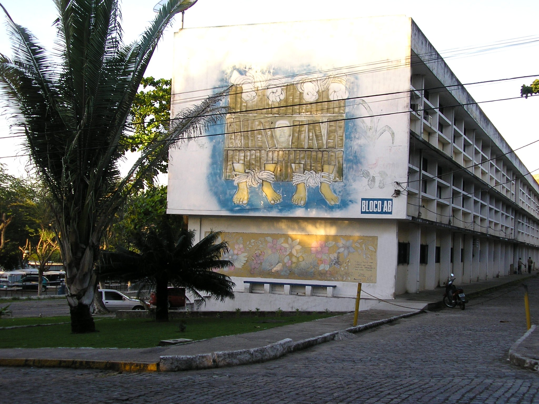 Bloco AB da Universidade Federal de Campina Grande, Paraíba, Brasil.